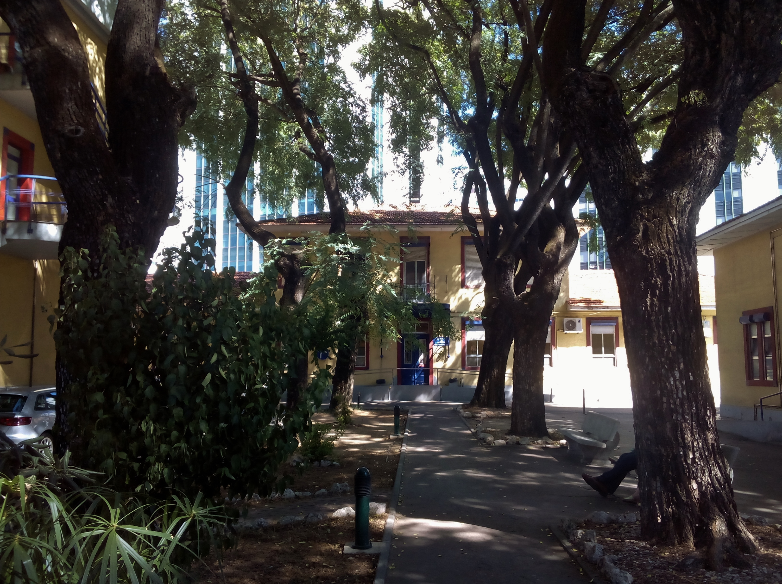 Alameda no Hospital Curry Cabral, em Lisboa.